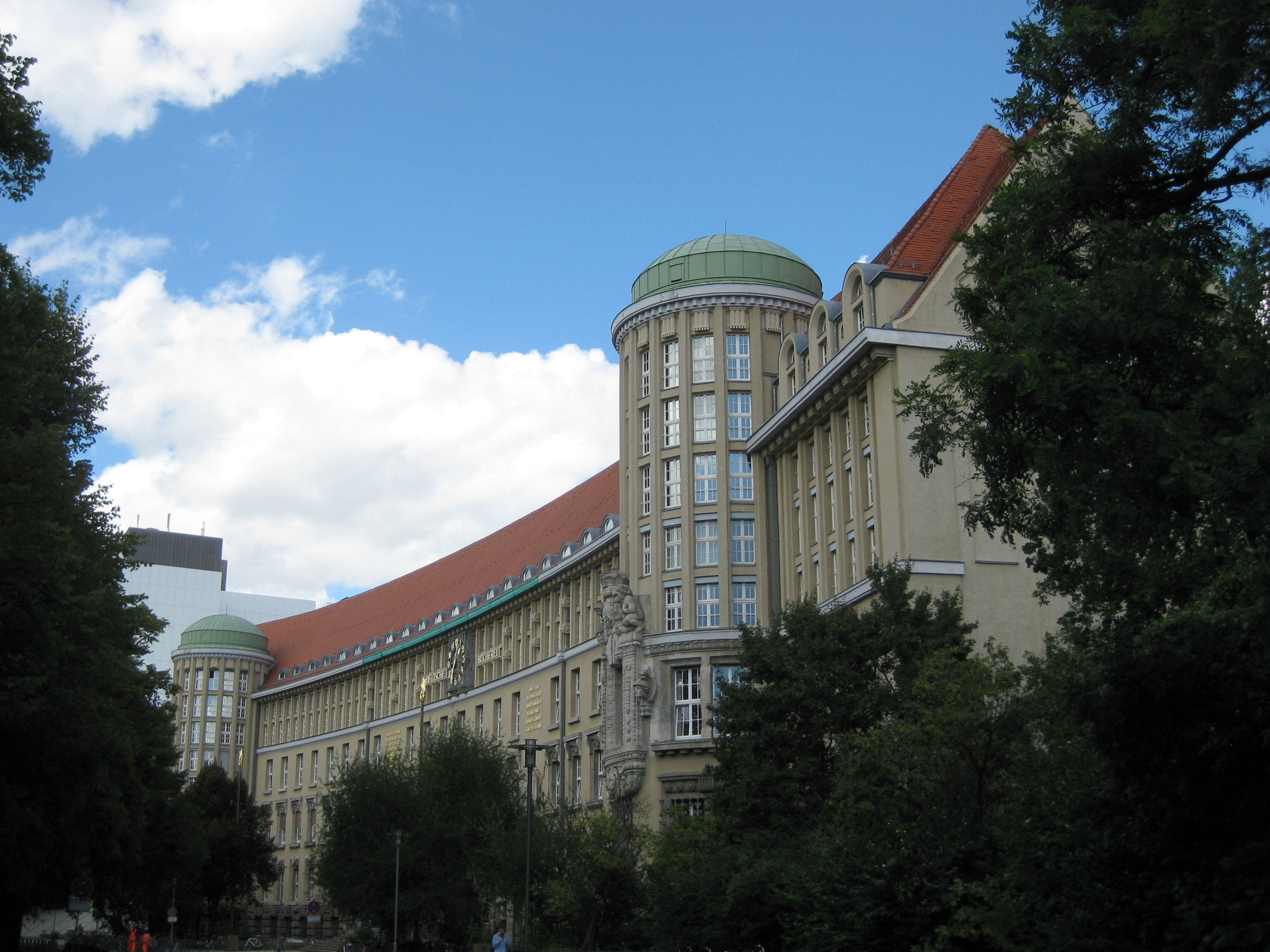 Die 1913 eröffnete Deutsche Bücherei zu Leipzig.